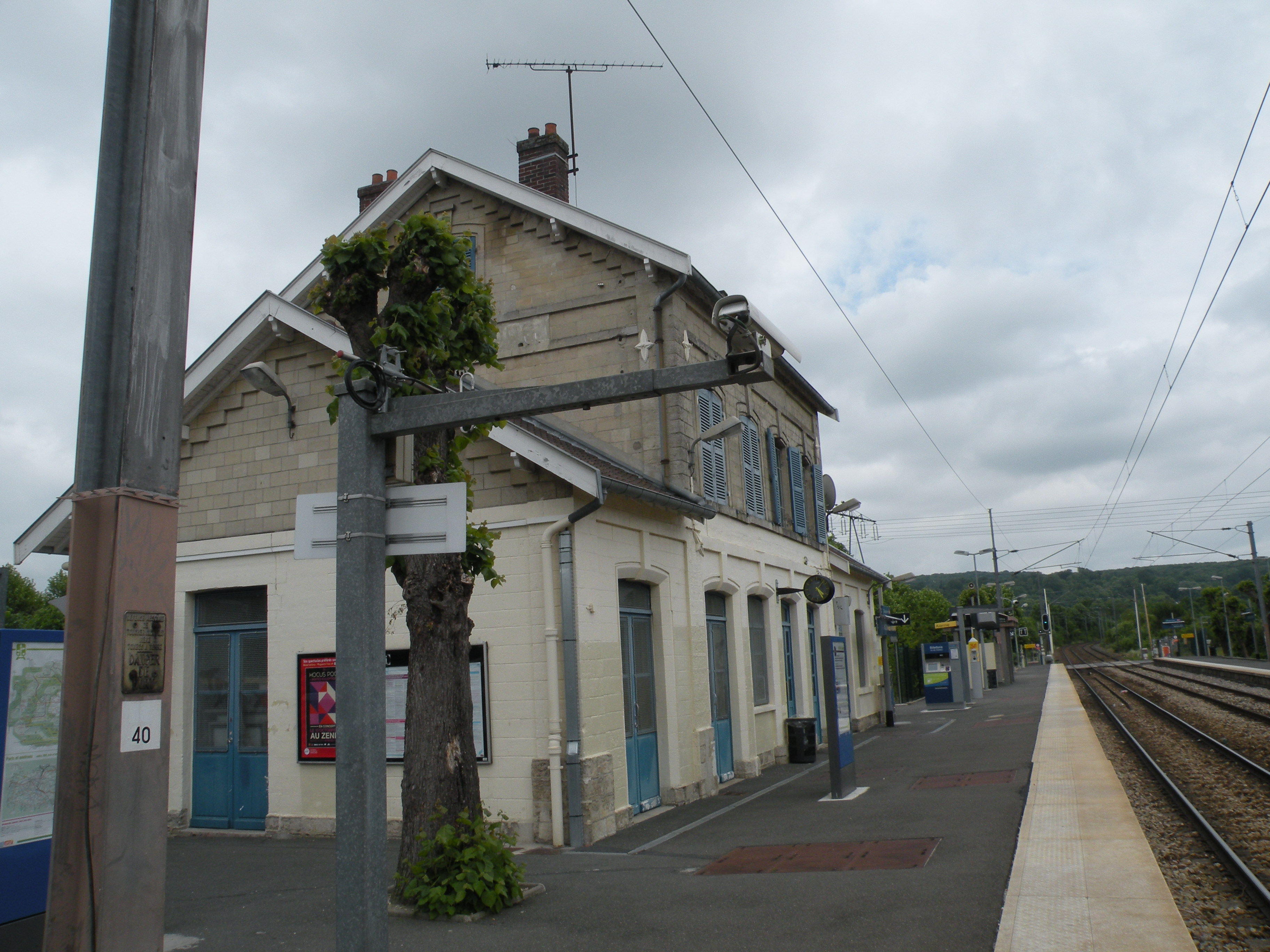 Gare de Nointel - Mours